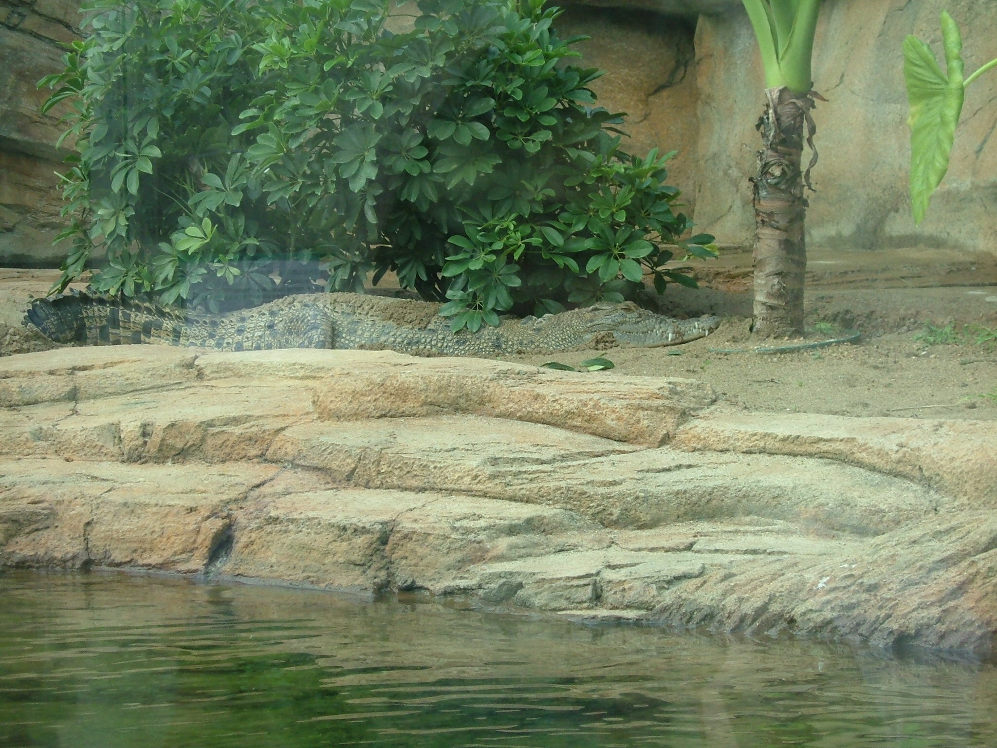 貝貝 (Crocodile Pui Pui)